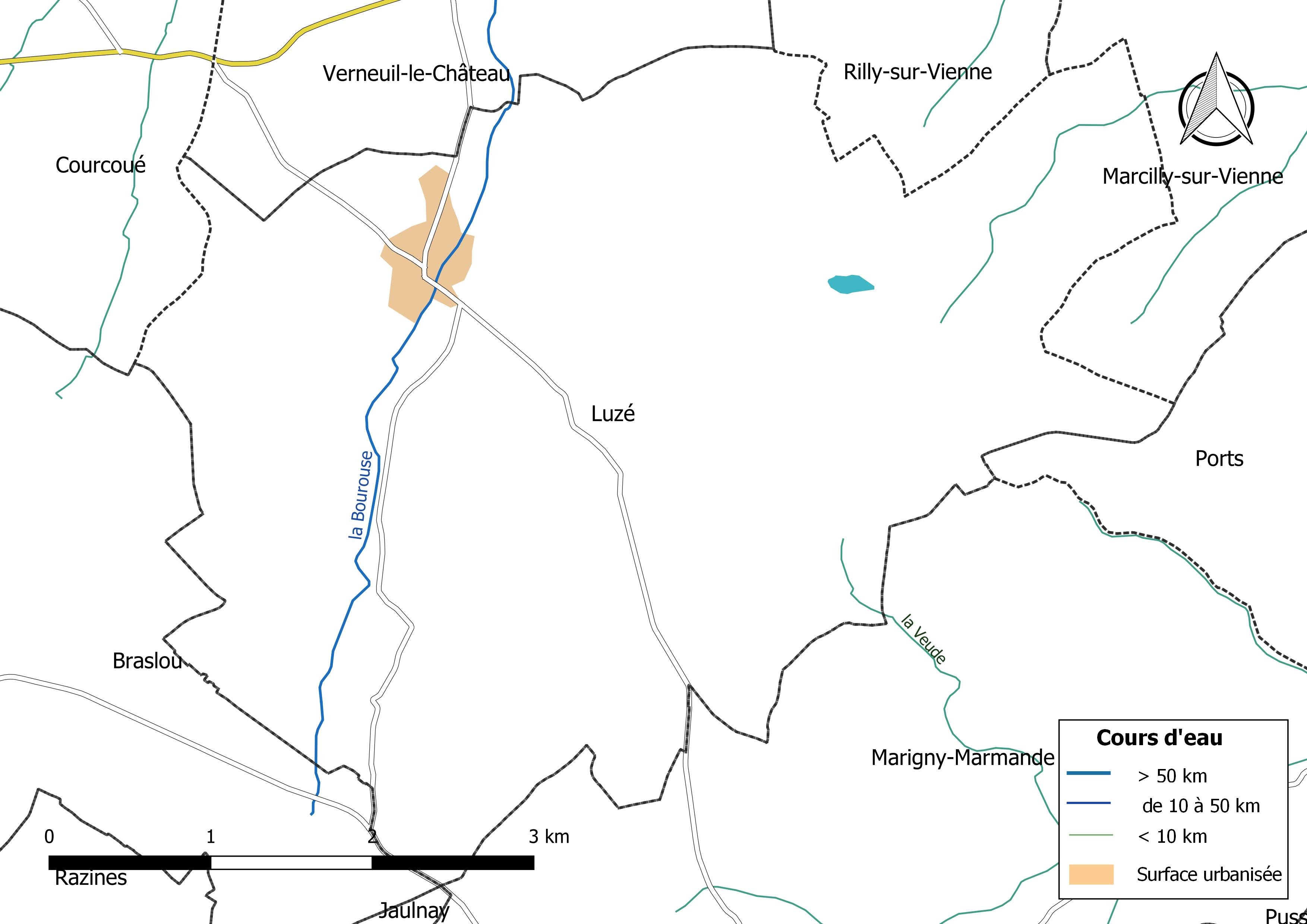 Carte du réseau hydrographique de la commune de Luzé (France).